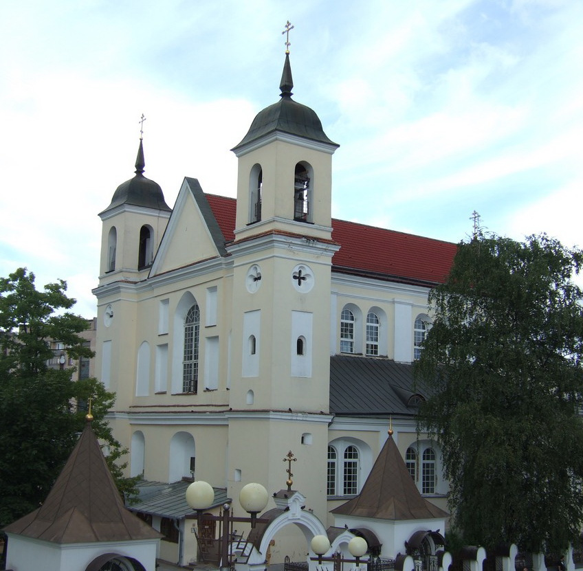 Свято-Петро-Павловская церковь (Екатерининская). Минск, ул. Раковская,4